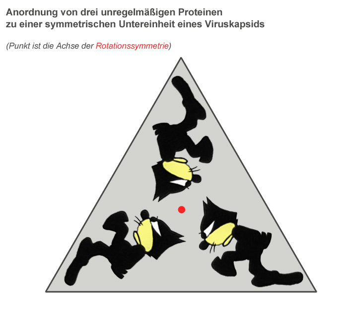 Anordnung von drei unregelmäßigen Proteinen zu einer regelmäßigen Untereinheit (Dreieck) eines Viruskapsids